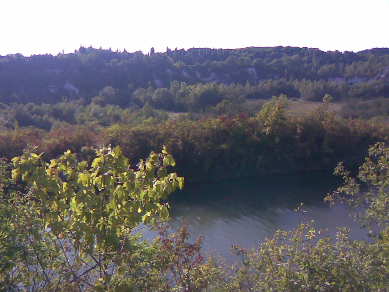 Ausgebeutete Mergelgrube HPC1 in Hannover-Misburg. Davor ist der Stichkanal des Mittellandkanals zu sehen. Er liegt deutlich höher als die Mergelgrube